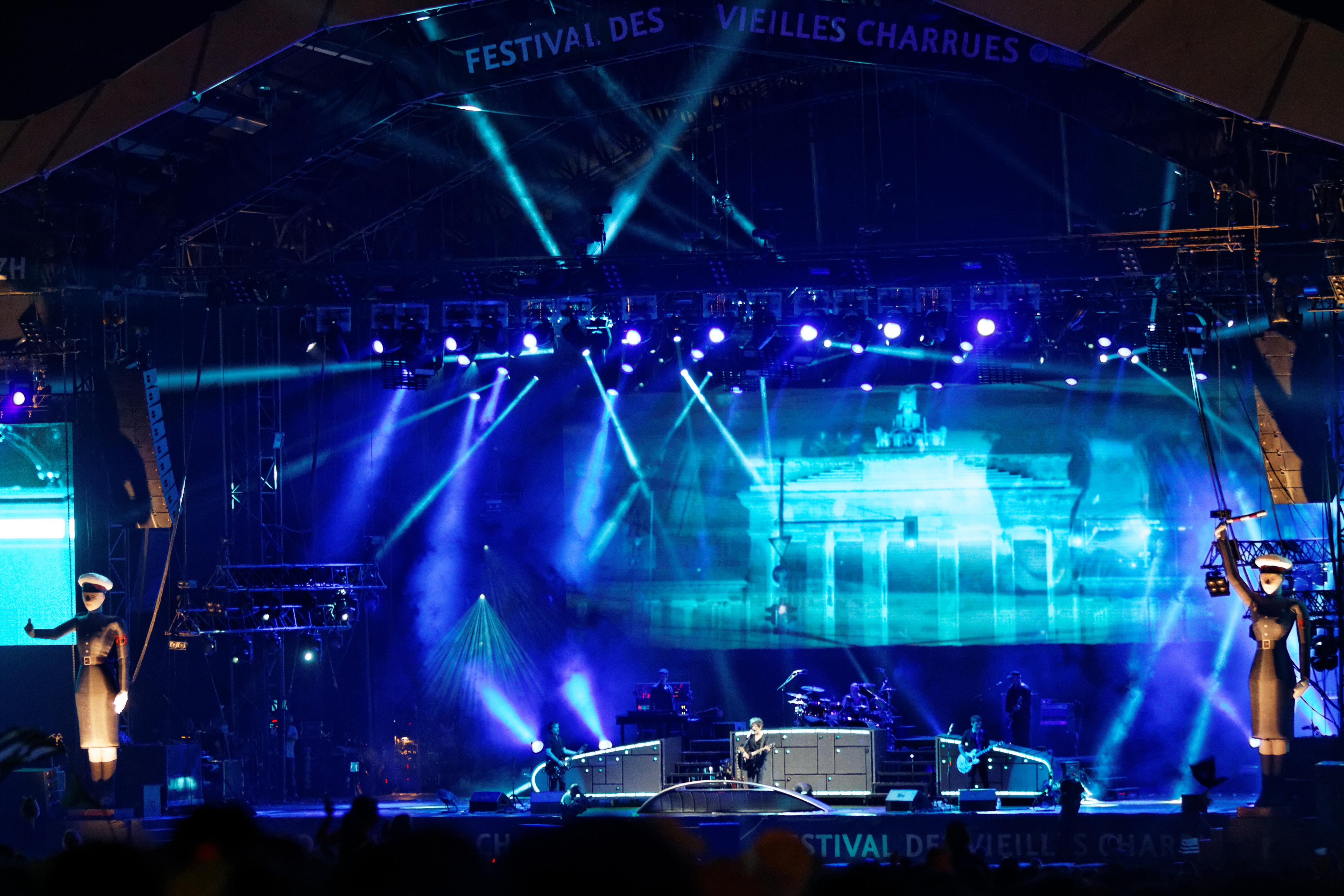 Indochine en concert sur la scène Glenmor lors du festival des Vieilles Charrues 2014.